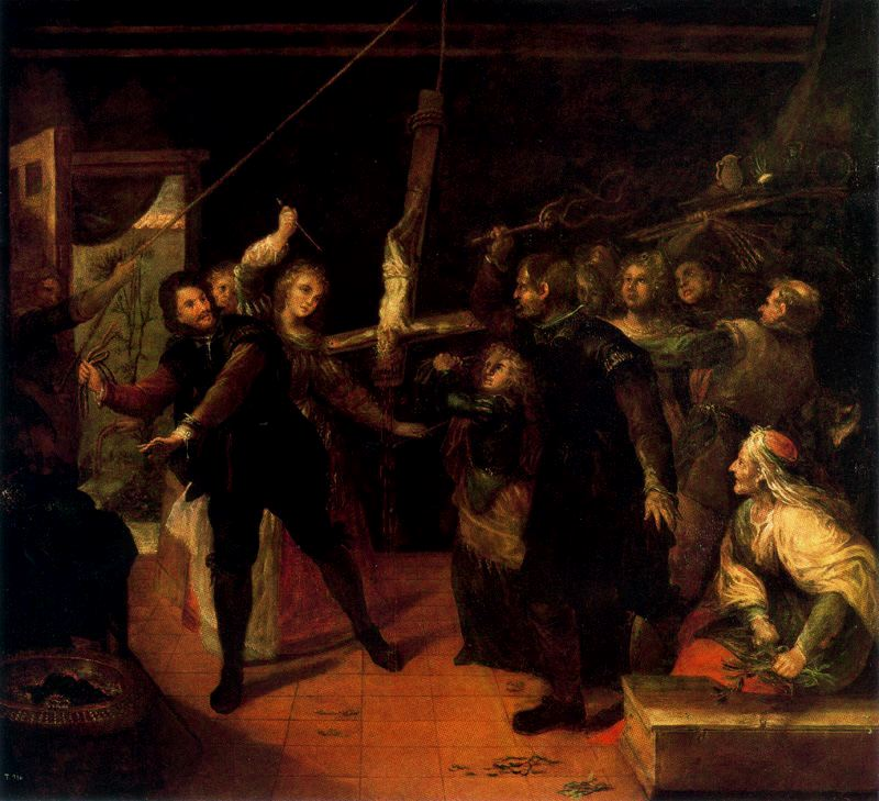 La obra representa a una familia de judaizantes españoles que hacia el año 1630 profanaron en Madrid una imagen de Cristo crufificado, lo que motivó que poco después se levantara en dicha ciudad un templo expiatorio conocido como la capilla del Cristo de la Paciencia.